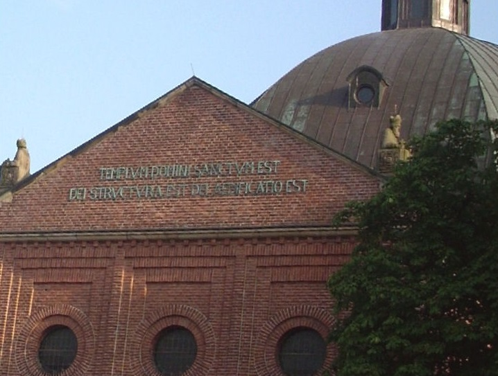 St. Augustinus, Nordhorn. Ausschnittvergrößerung Kircheninschrift.